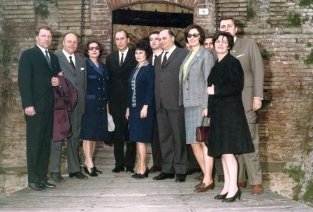 Renato Bacchini accanto alla moglie Marta incontrano una delegazione russa